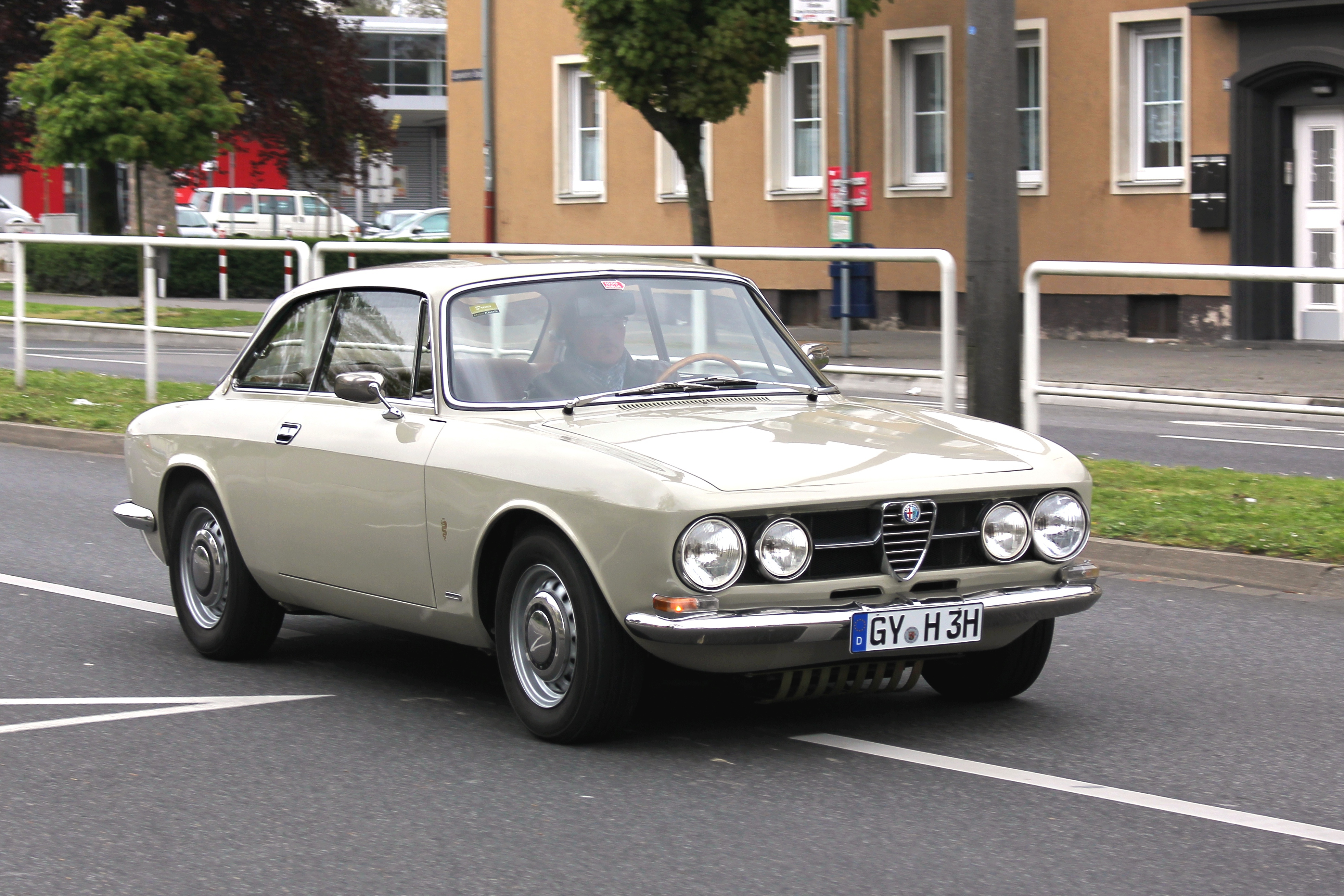 Alfa Romeo 1750 GT Veloce, Baujahr 1968, fiktives Kennzeichen